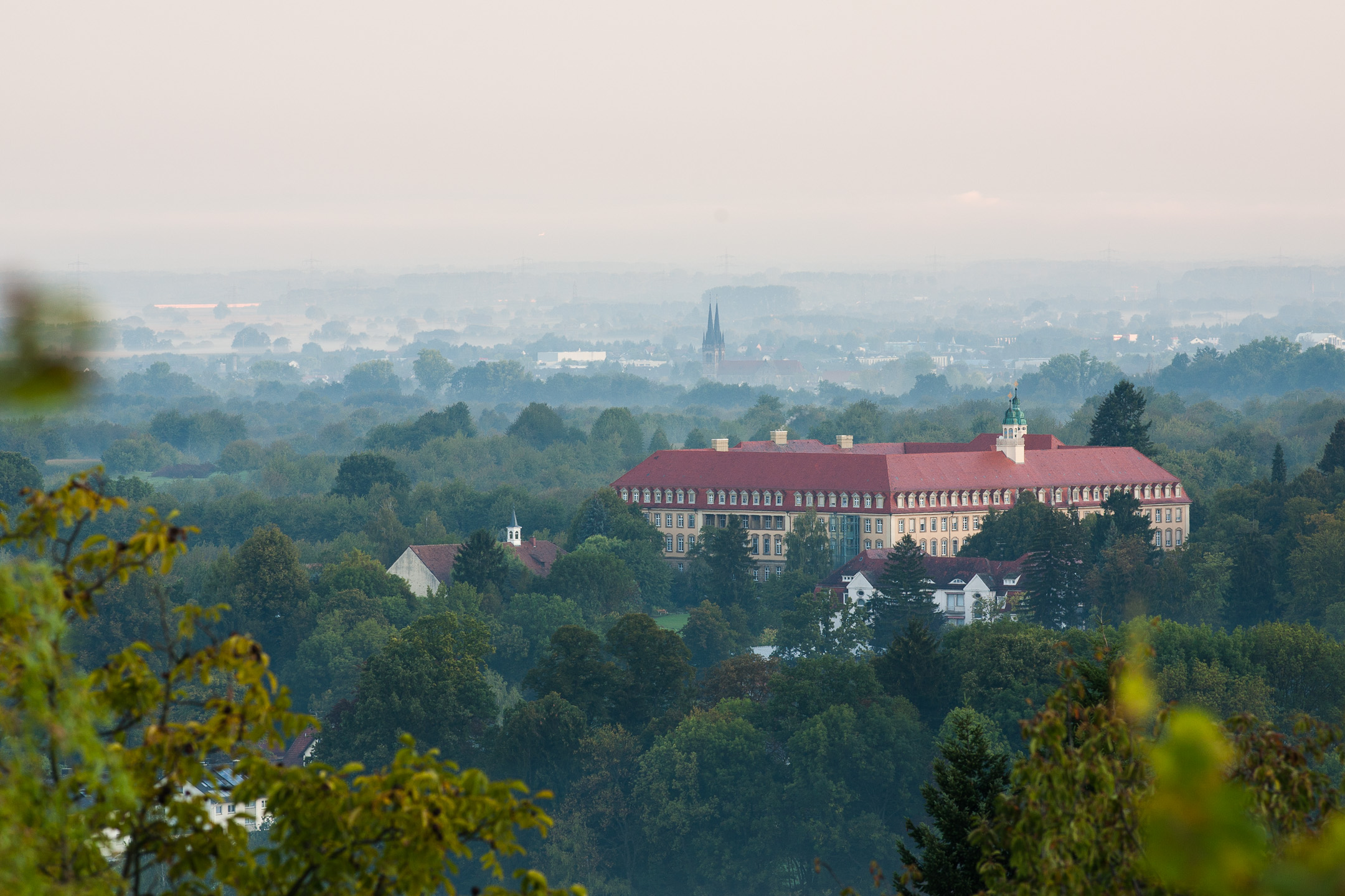 Das Kloster Erlenbad von Sasbachwalden aus gesehen. Im Hintergrund Ottersweier.